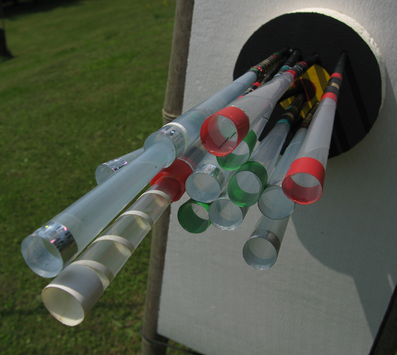 Flèches de l'école du souffle "SARBACANA" (elles peuvent s'emboiter l'une dans l'autre). Fondateur : Michel-Laurent Dioptaz